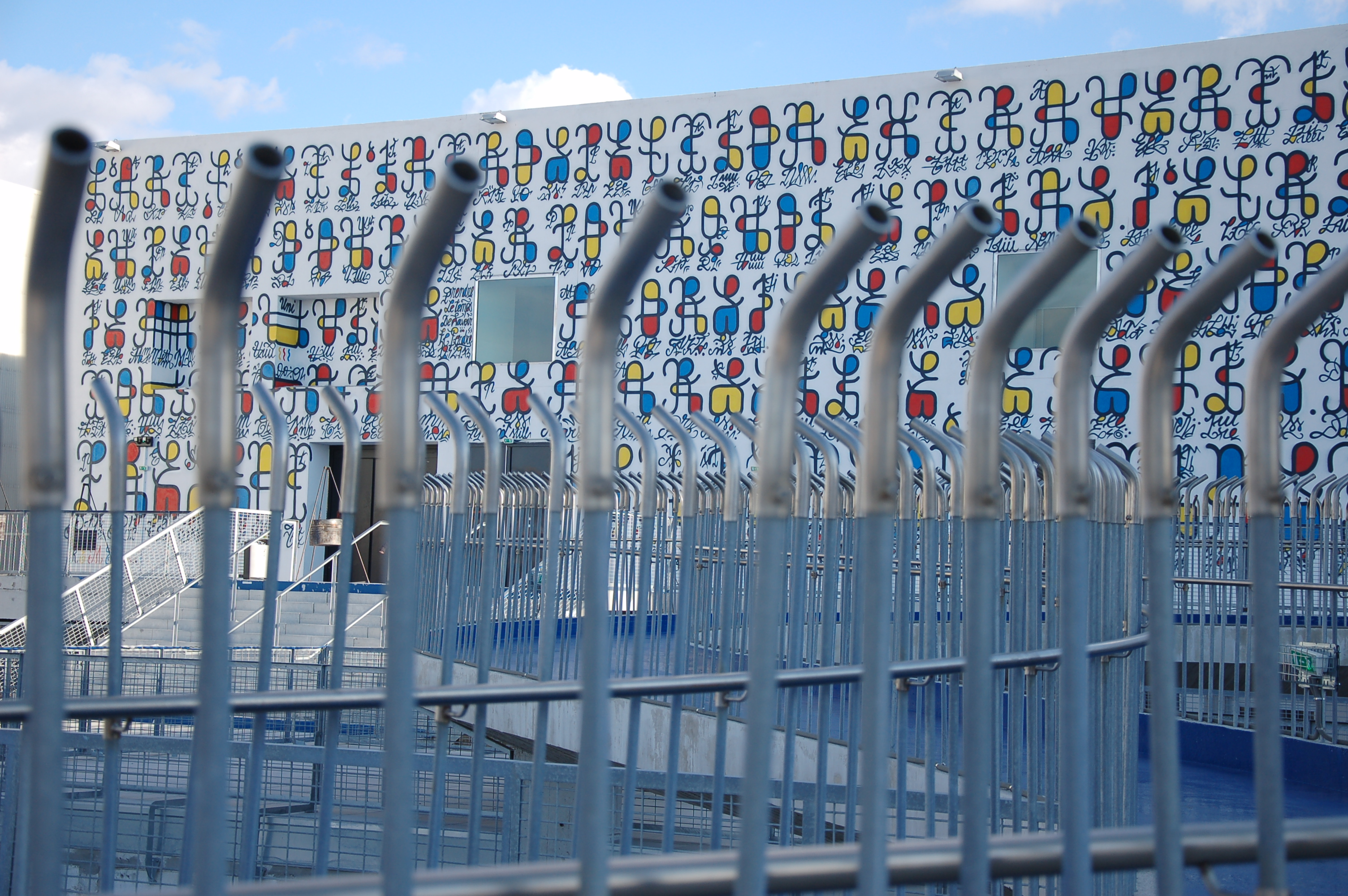 La Friche de la Belle de Mai donne le la de la scène culturelle à Marseille. Elle se situe sur le site de la Manufacture de Tabac de Marseille qui a cessé ses activités en 1990. Le toit terrasse offre une vue sur le quartier.